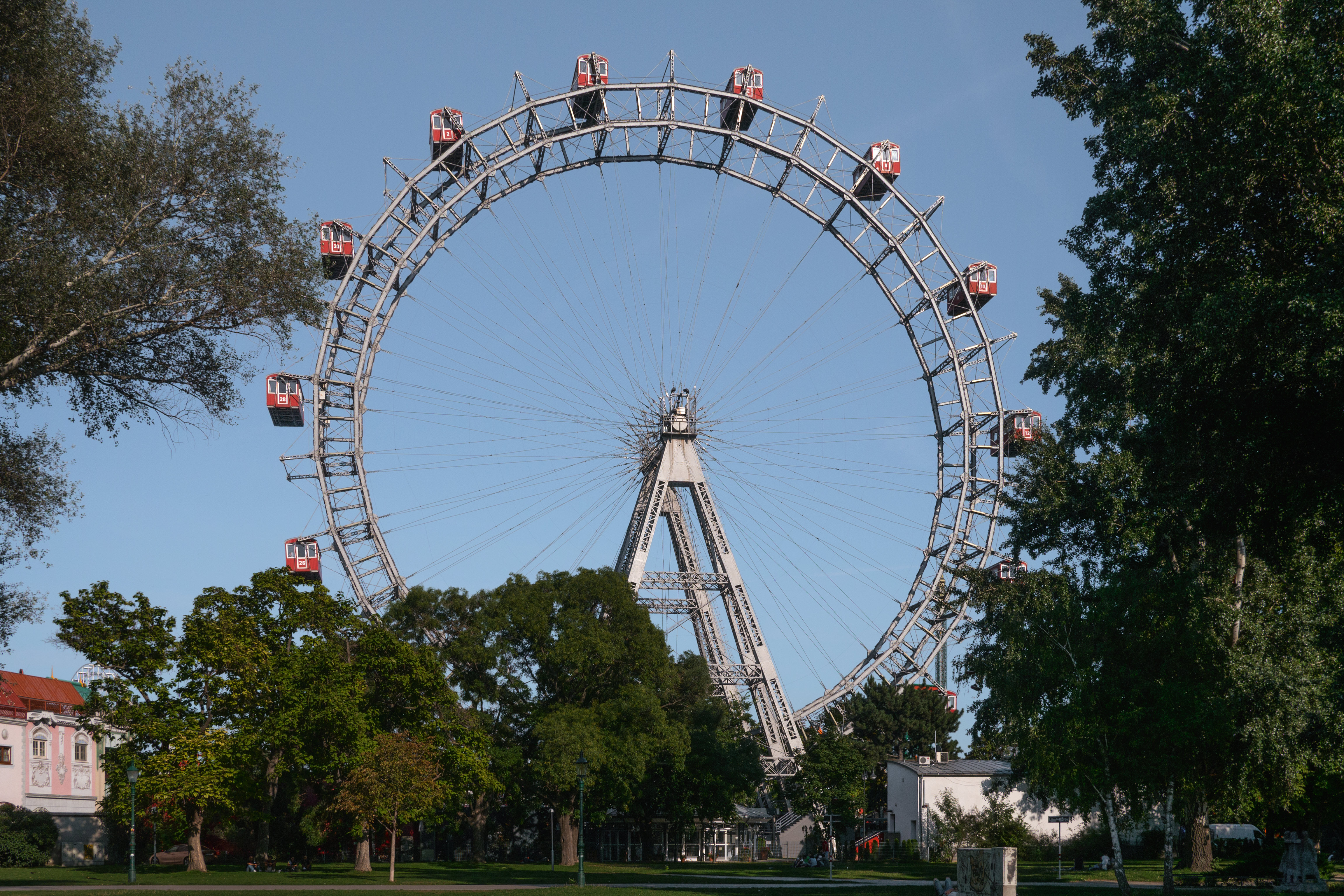 Vergnügungsstätte, Riesenrad; entzerrt